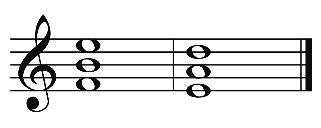 accord de quarte/enrichissements